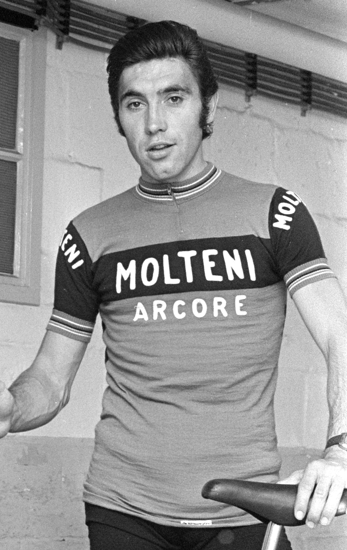 Nationaal Archief Beschrijving: Eddy Merckx Datum: 2 augustus 1973 Bestanddeelnummer 926-5866 Vervaardiger: Anefo / Verhoeff, Bert URL: Voor meer informatie over het Nationaal Archief: Voor meer foto's uit deze en andere collecties, bezoek onze Beeldbank:, U kunt ons helpen onze kennis van de fotocollecties te verrijken door tags en commentaren toe te voegen. Herkent u mensen of locaties of heeft u een bijzonder verhaal te vertellen bij één van de foto's, laat dan een reactie achter (als u ingelogd bent bij Flickr) of stuur een mailtje naar